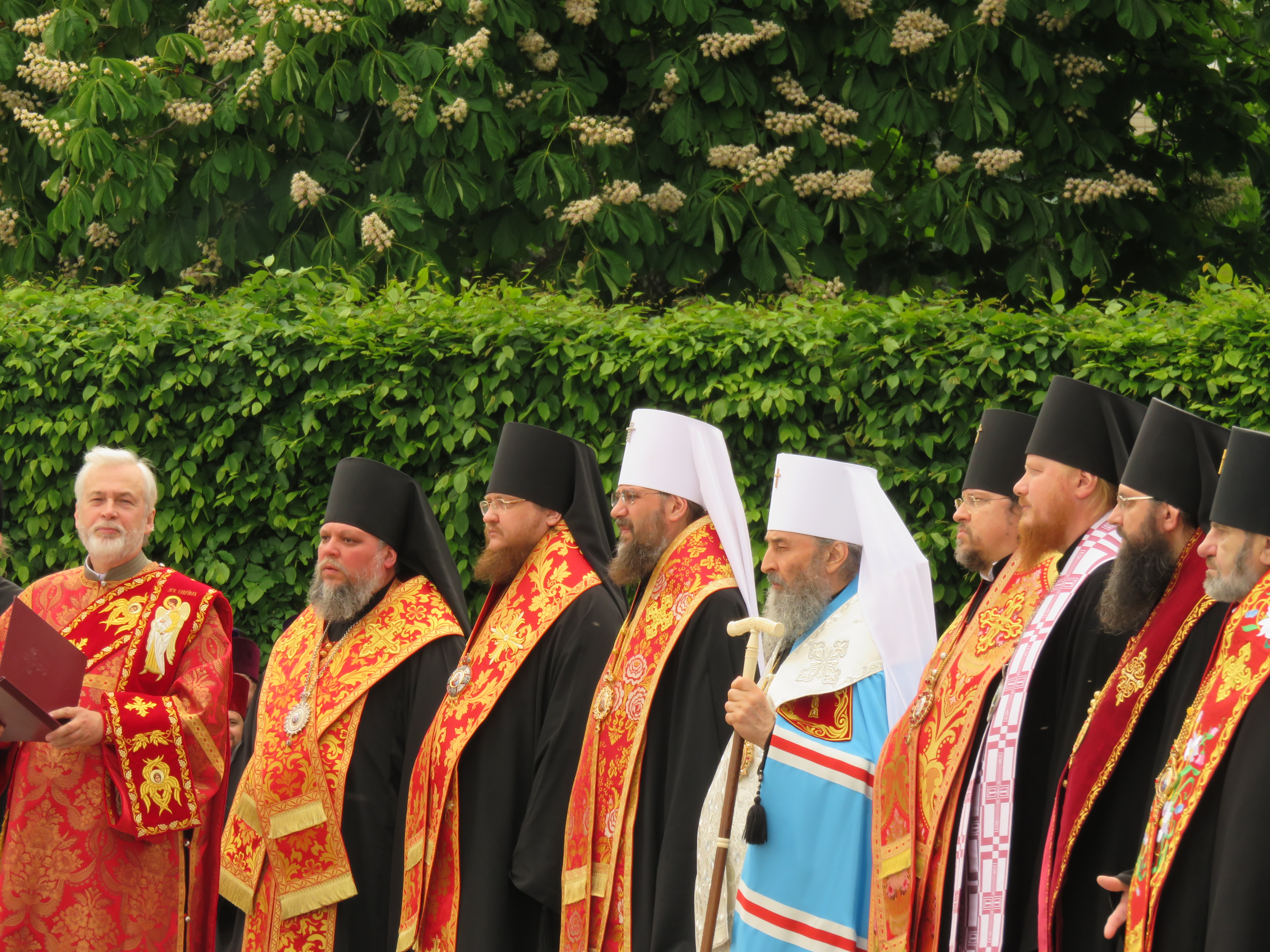 Митрополит Онуфрій (Березовський) під час молебню 8 травня 2016 у Парку Слави